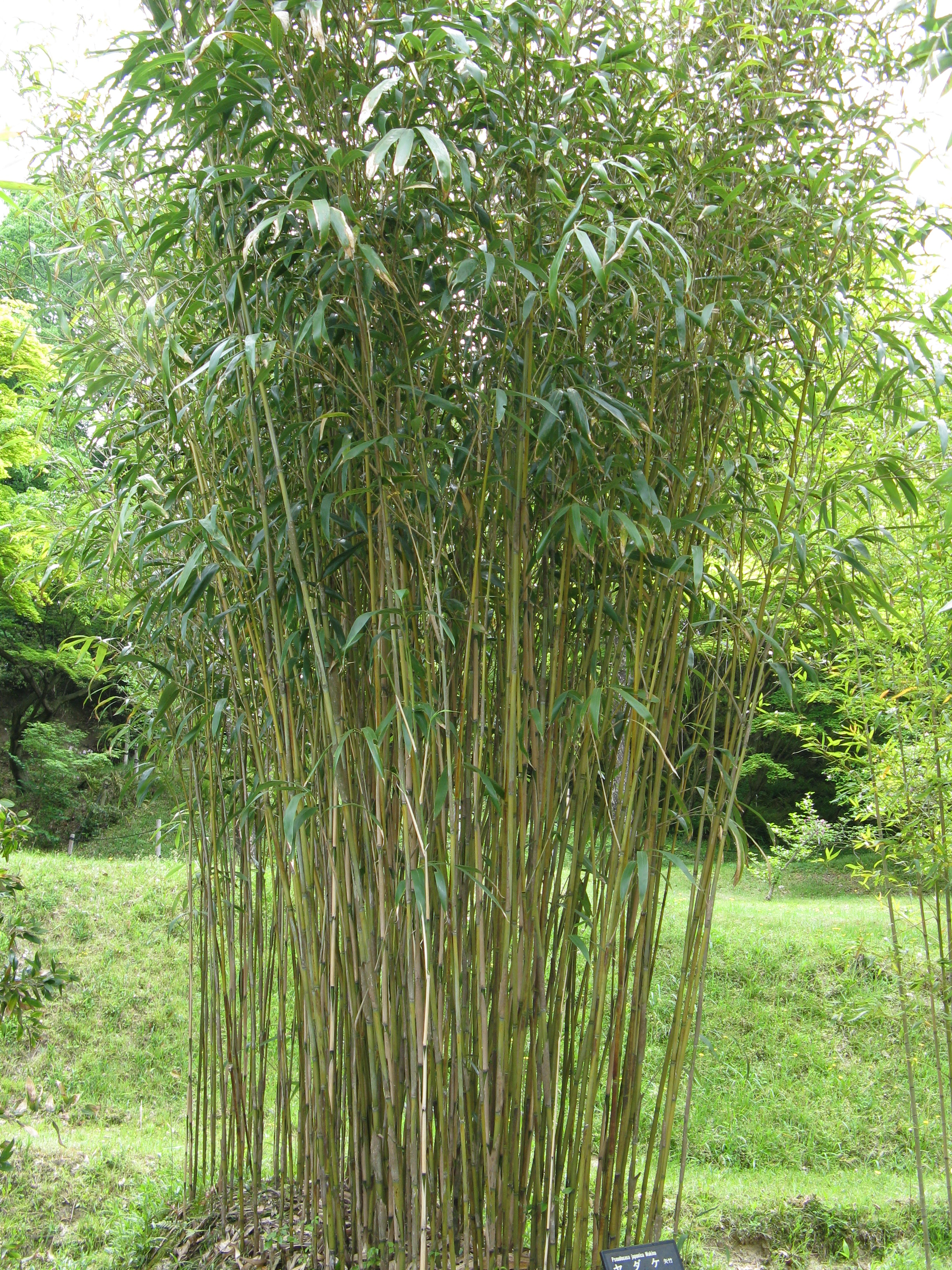 Pseudosasa japonica